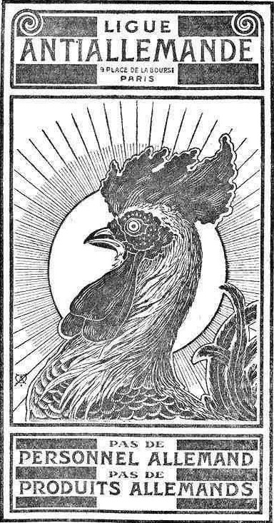 "Panonceau de la Ligue antiallemande".